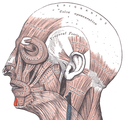 Mentalis muscle